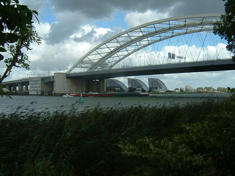 van Brienenoordbrug, dubbele boog goed zichtbaar, foto op 12 sept 2004 vanaf het eiland van Brienenoord gemaakt